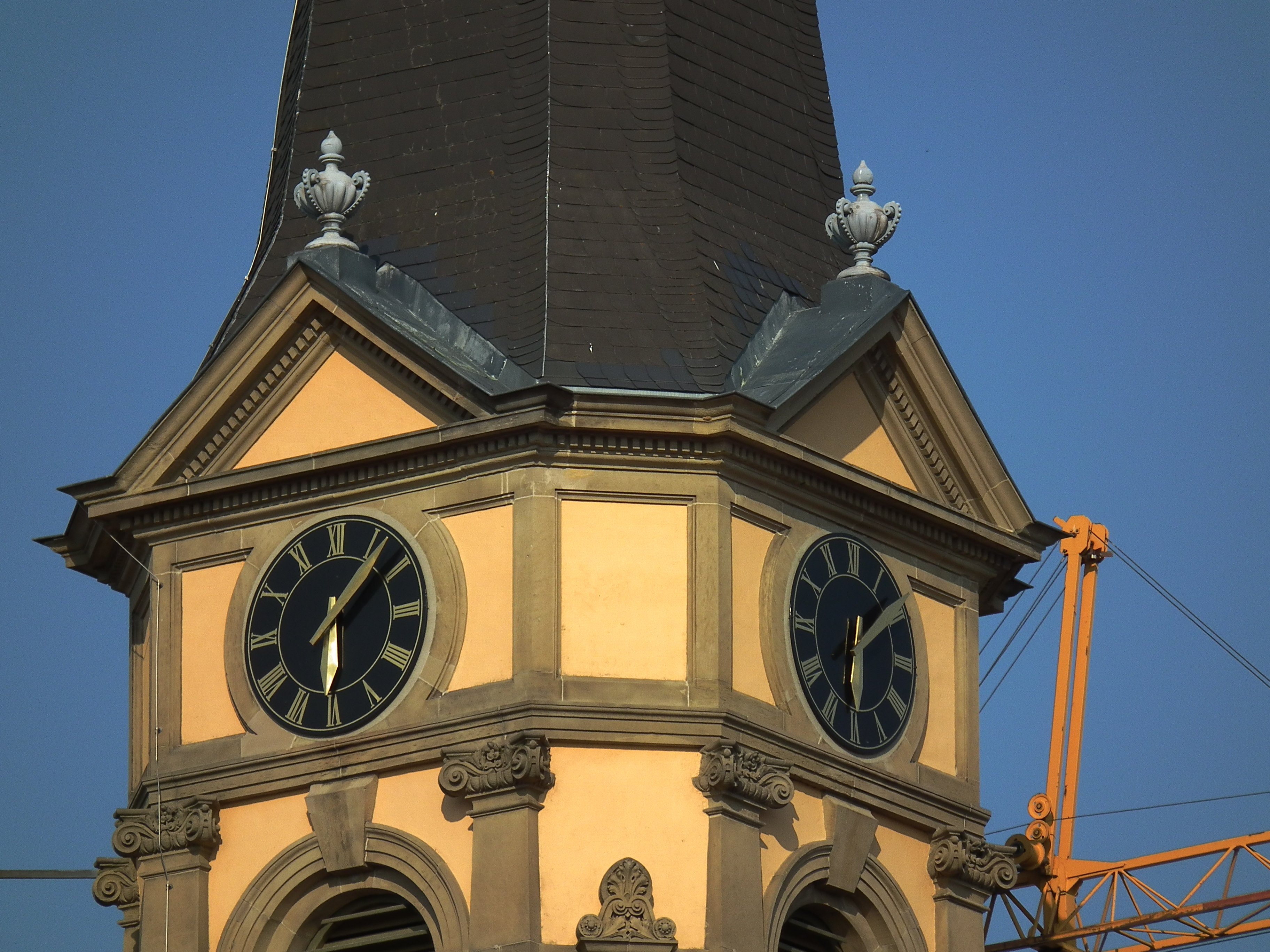 Kirchturmuhren der evangelischen Kirche in Nußloch (Baden-Württemberg, Deutschland)